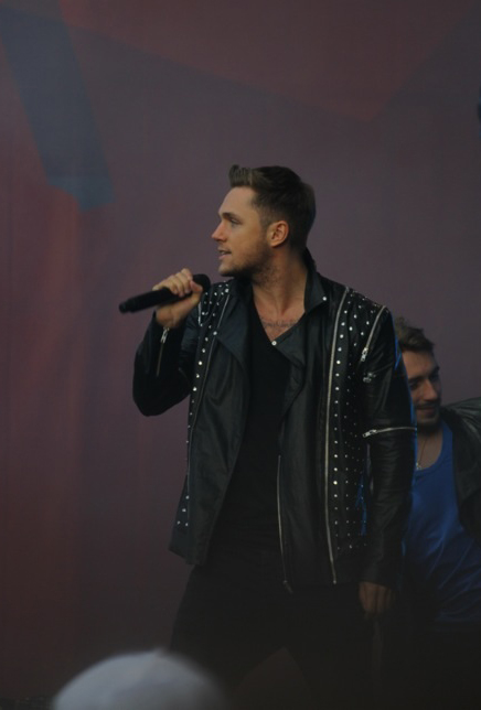 Влад Соколовский Лужники день города. Исходник без рамки есть.